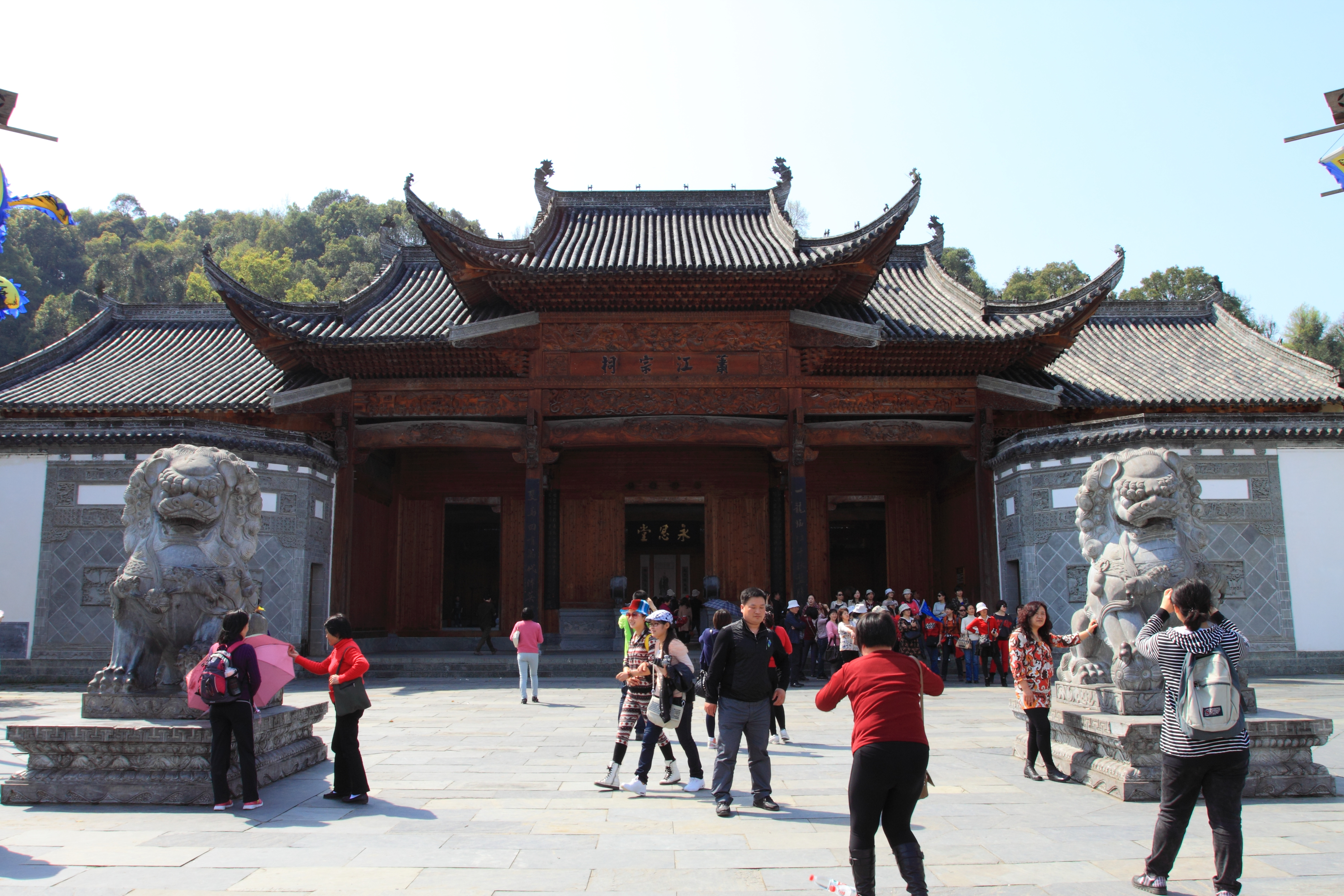 江湾村萧江宗祠大门，位于中国江西省婺源县。